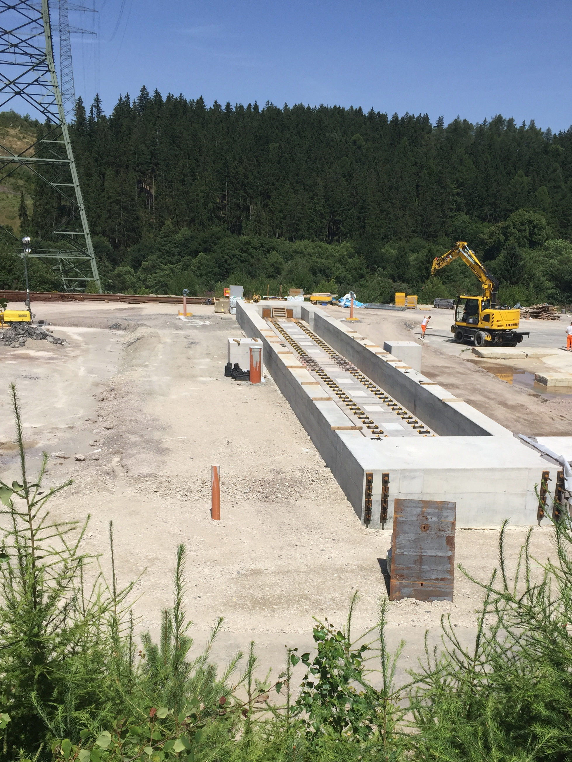 Feste Fahrbahn System Porr im Bereich zwischen zwei Brückenüberbauten, Nachbau am nördlichen Portal Tunnel Brandkopf